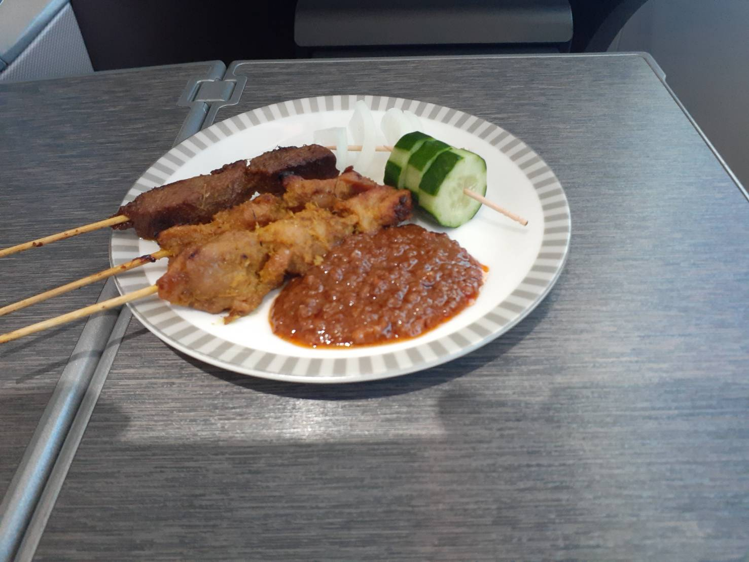 シンガポール航空のビジネスクラスの機内食として提供されたサテ（2020年2月28日、福岡→シンガポール便にて）。